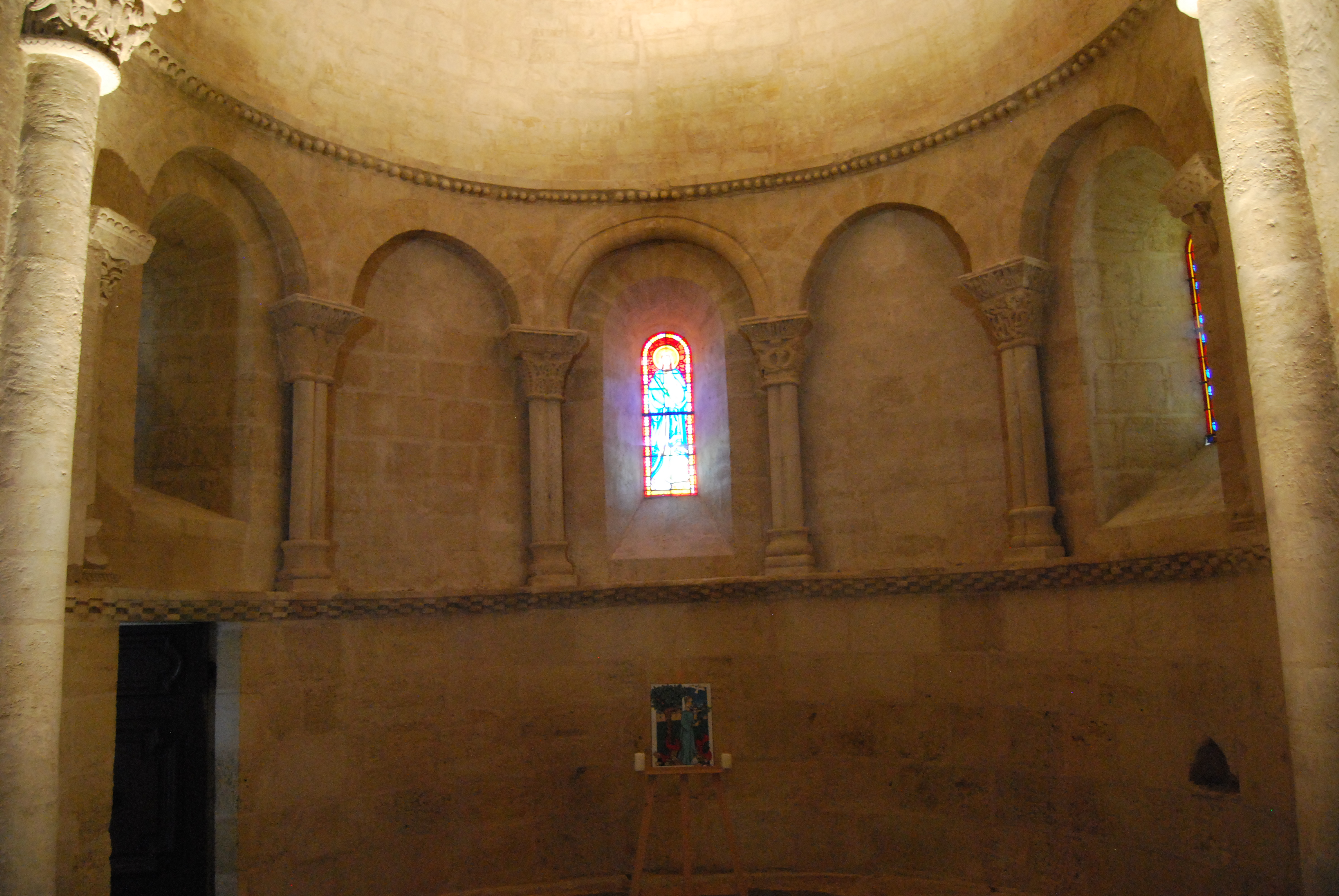 Lignan église Sainte-Eulalier